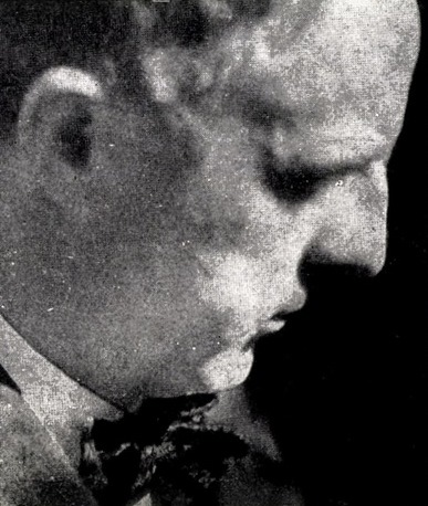 Lorentz Harboe Ree. Ukjent fotograf, fra «Vi fra NTH: De første ti kull 1910–1919» (1934), s. 87.